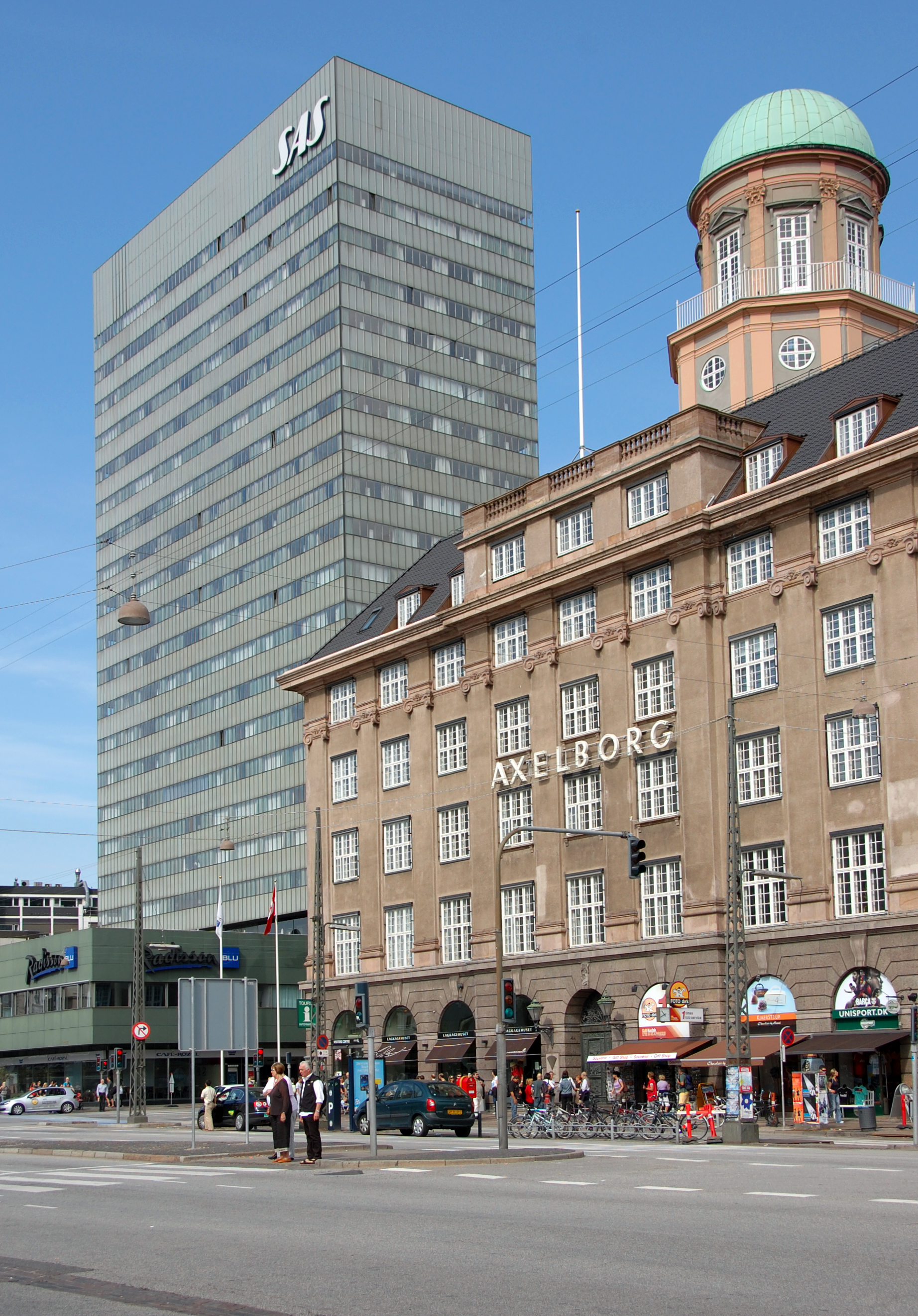 Axelborg and the SAS Royal Hotel at Vesterbrogade in Copenhagen, Denmark